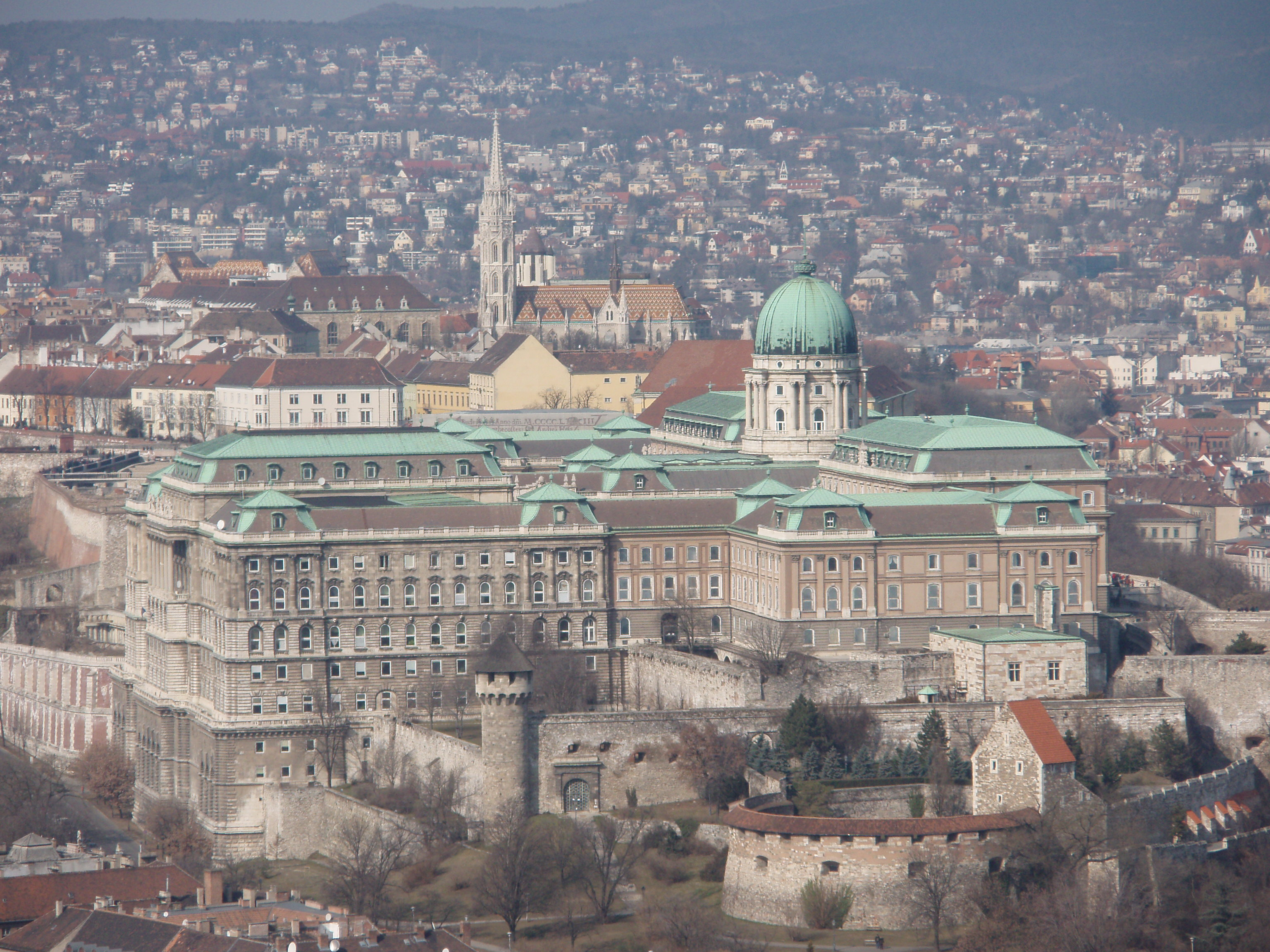 Budavári Palota (Buda Castle)